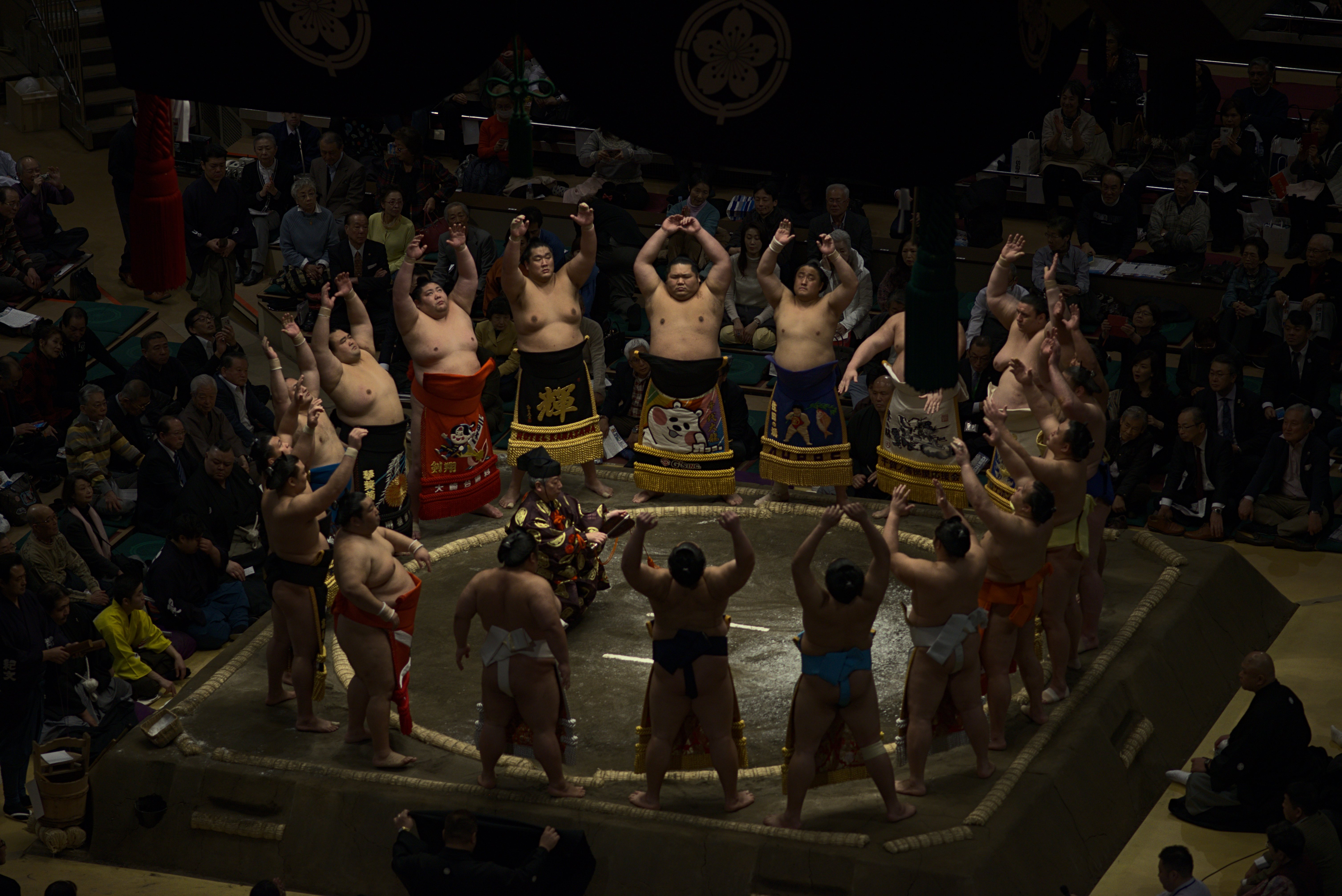 Tokyo-Japan-2020_0027